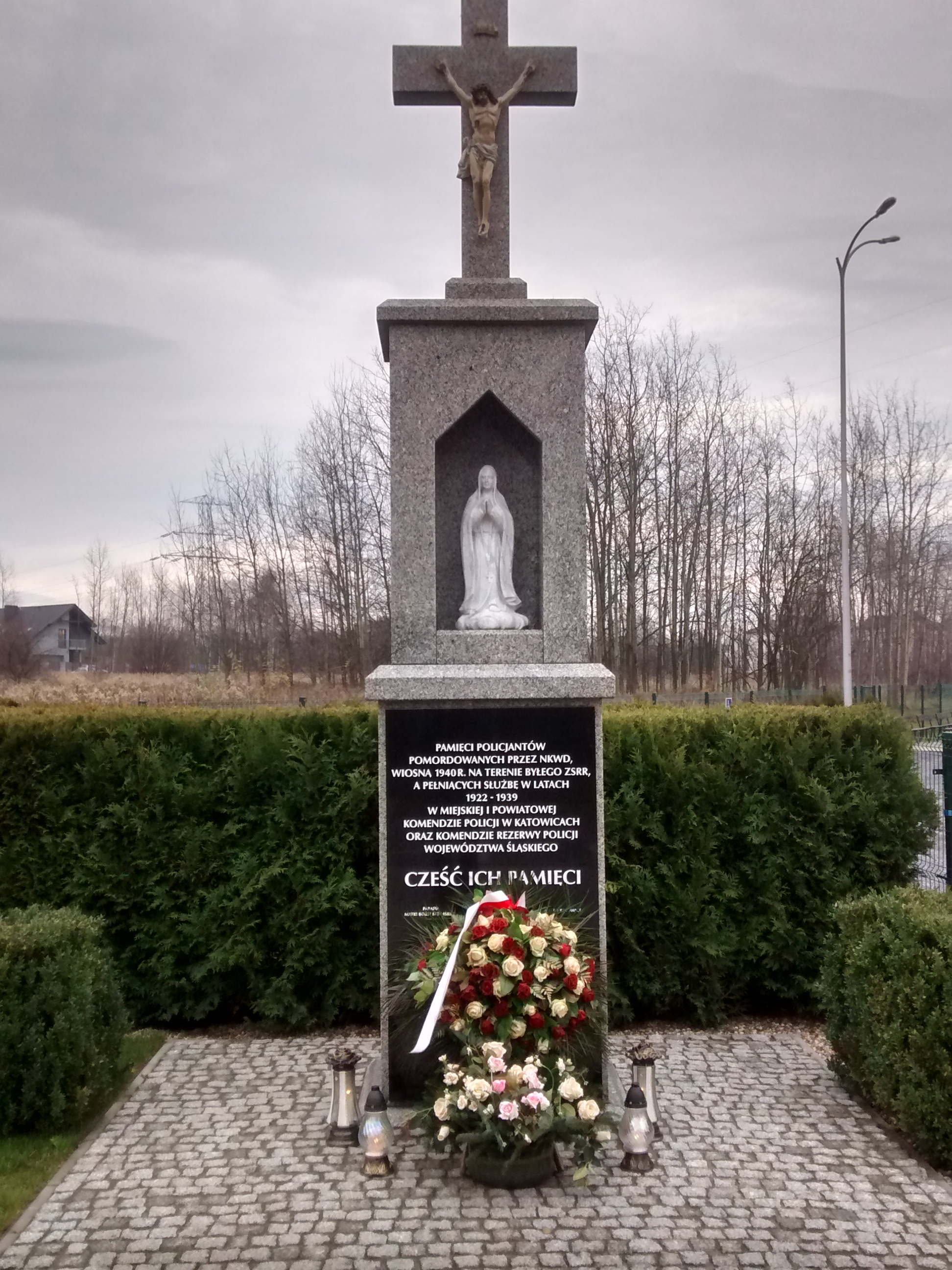 Krzyż z tablicą przy kościele pw. Matki Boskiej Fatimskiej w Katowicach-Piotrowicach (ul. Bukszpanowa)